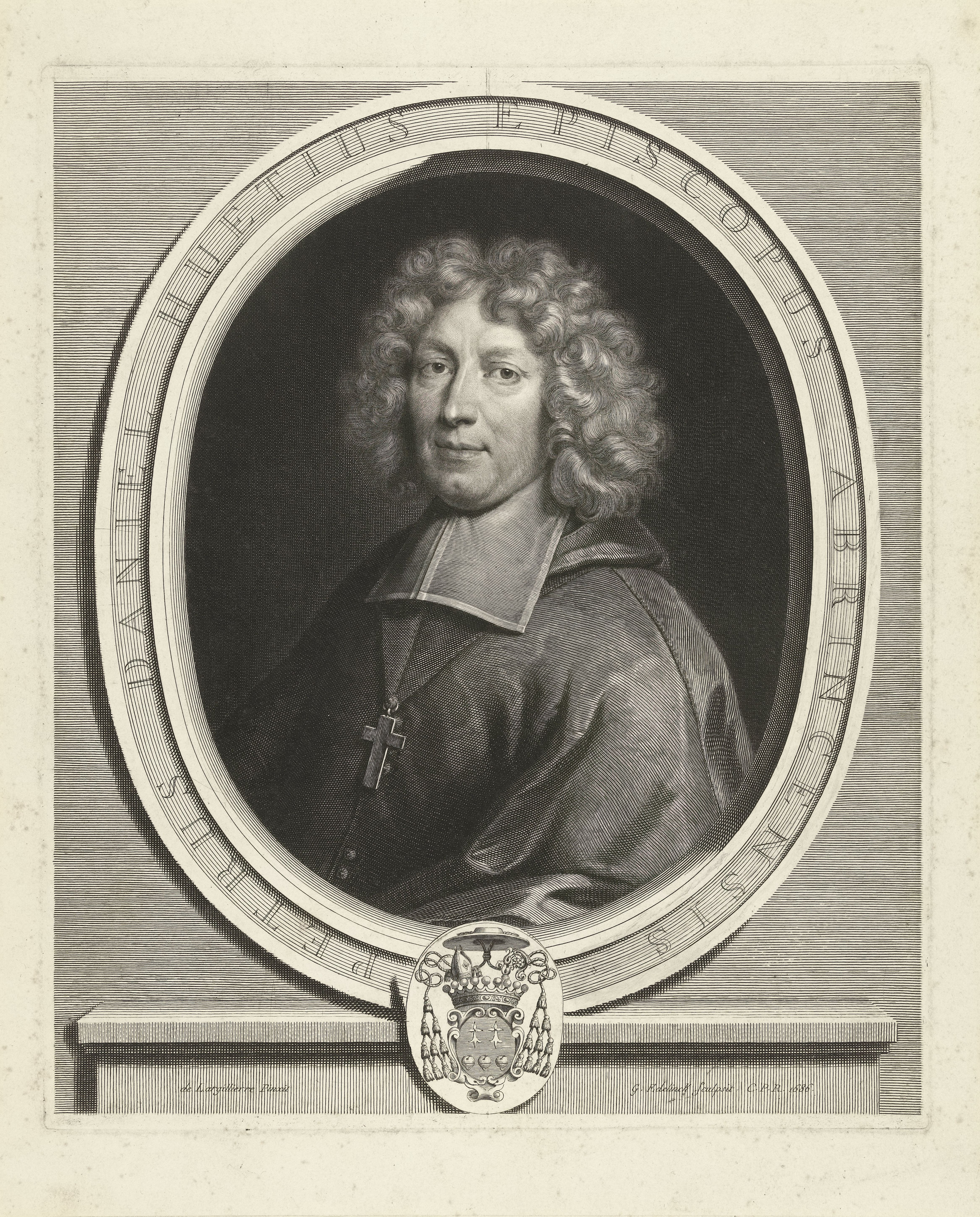 IdentificatieTitel(s): Portret van Pierre-Daniel HuetPetrus Daniel Huetius (titel op object)Objecttype: prent Objectnummer: RP-P-BI-7523Catalogusreferentie: Robert-Dumesnil 224-2(2)Opschriften / Merken: verzamelaarsmerk, verso, gestempeld: Lugt 240Omschrijving: Portret van de Franse filosoof en bisschop Pierre-Daniel Huet (1630-1721), afgebeeld in ovale omlijsting met wapen.VervaardigingVervaardiger: prentmaker: Gerard Edelinck (vermeld op object)naar schilderij van: Nicolas de Largillière (vermeld op object)verlener van privilege: Lodewijk XIV (koning van Frankrijk) (vermeld op object)Plaats vervaardiging: prentmaker: Parijsnaar schilderij van: Frankrijkverlener van privilege: FrankrijkDatering: 1686Fysieke kenmerken: gravureMateriaal: papier Techniek: graveren (drukprocedé)Afmetingen: plaatrand: h 400 mm × b 333 mmOnderwerpWie: Pierre Daniel HuetVerwerving en rechtenVerwerving: overdracht van beheer 1816Copyright: Publiek domein